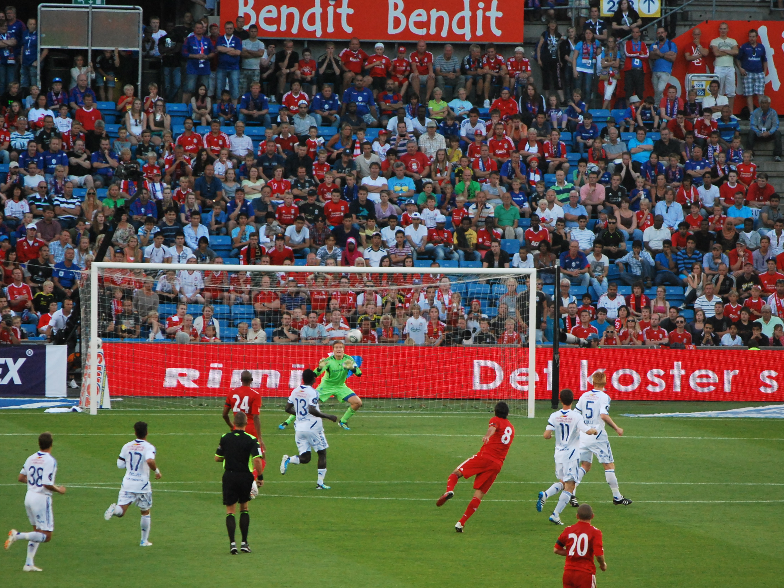 Friendly - 1. august 2011 at Ullevål. Result: 3-3. Vålerenga IF v Liverpool FC, 1 August 2011